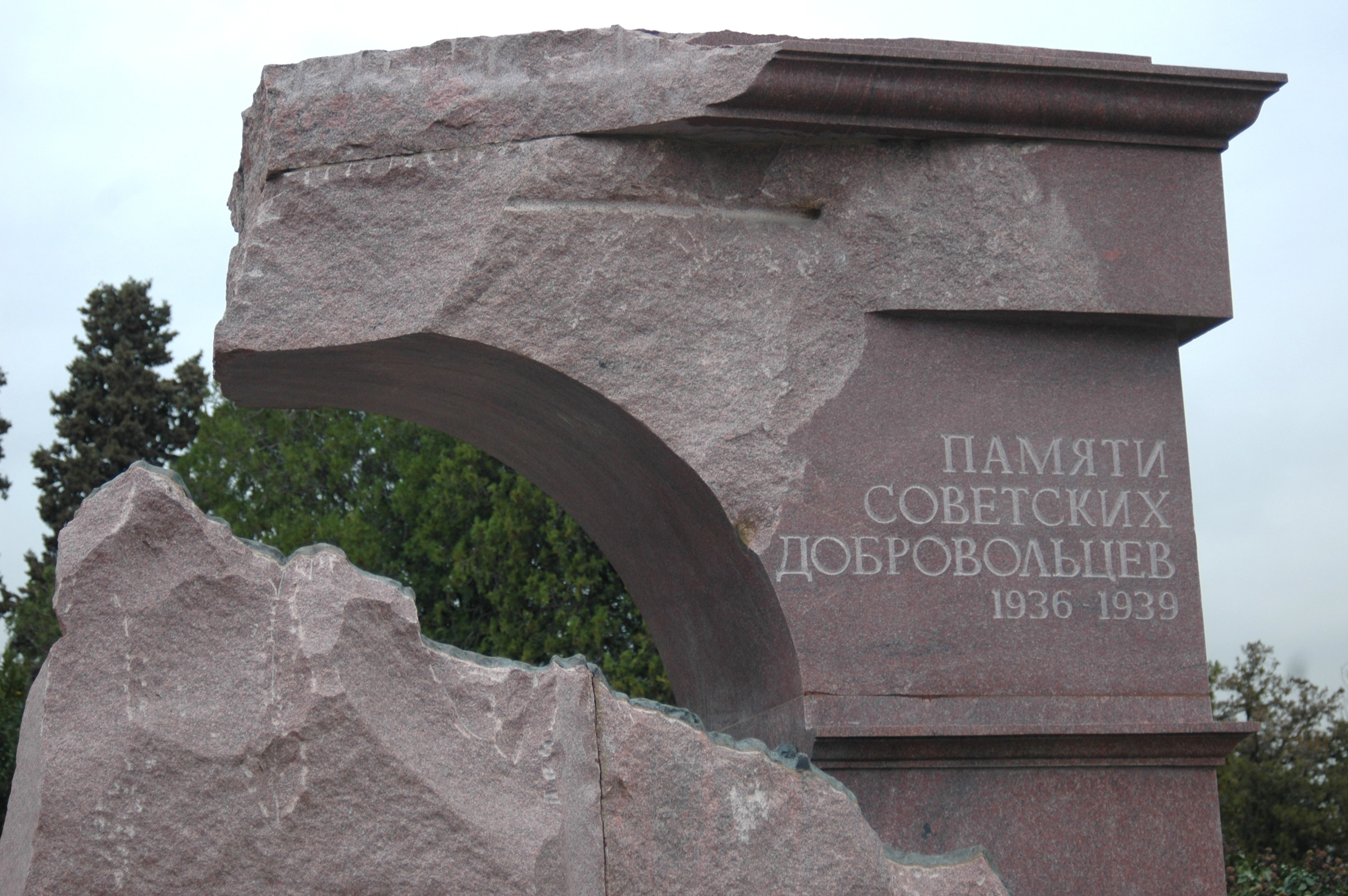 Inscripción dedicatoria en ruso sobre el monumento a los voluntarios soviéticos caídos en la Guerra Civil en España